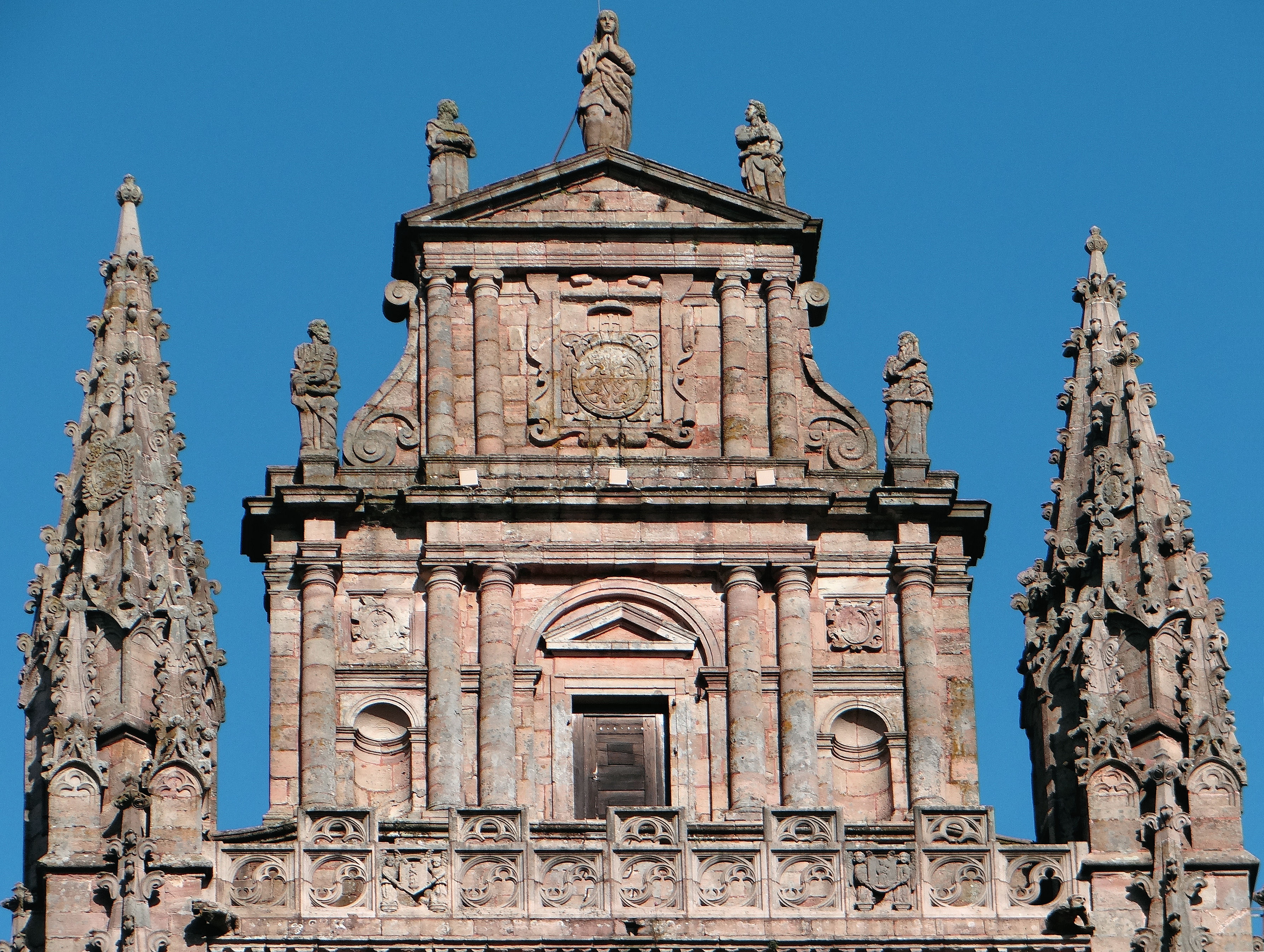 Rodez - Cathédrale Notre-Dame - Façade